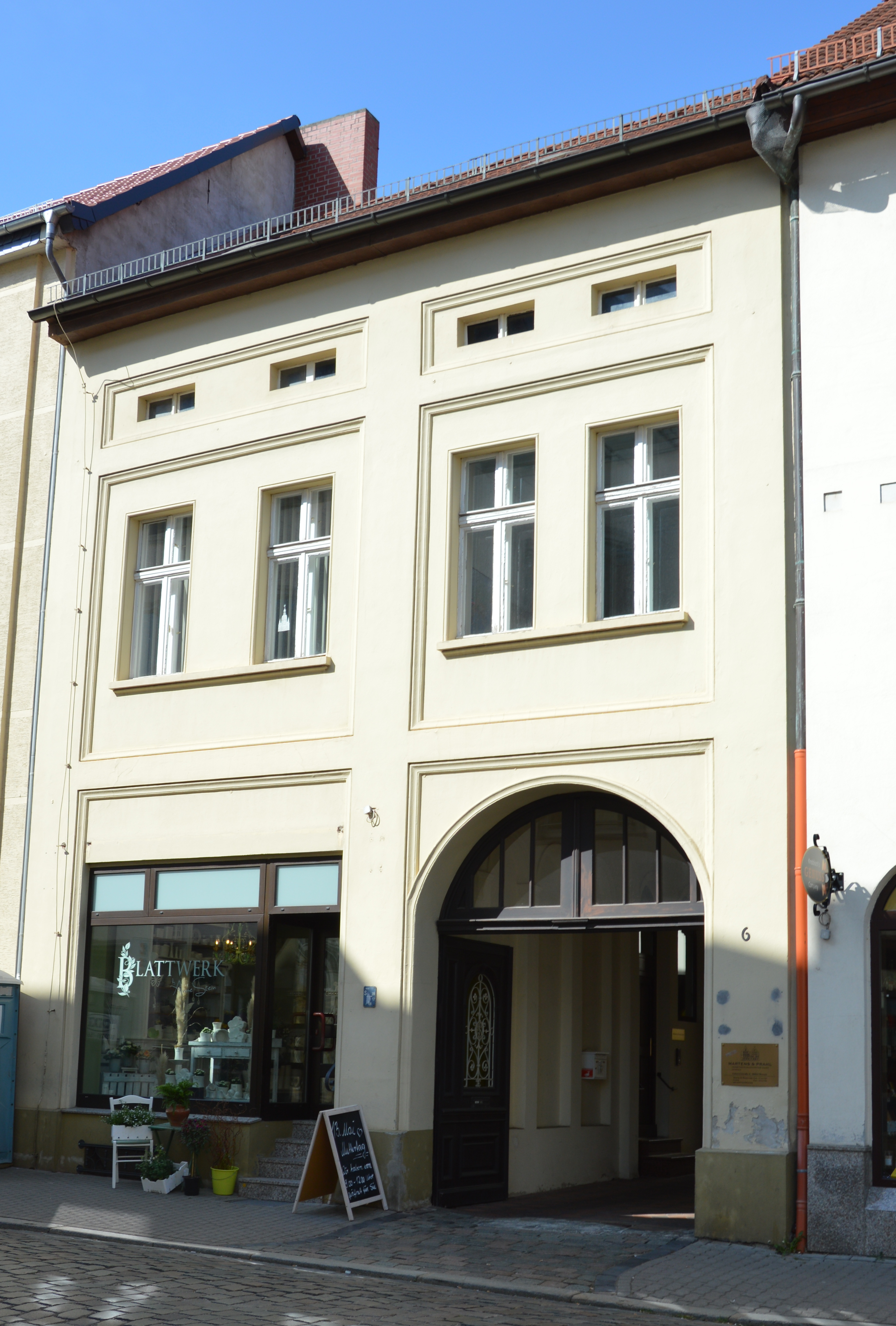 Haus Johannesstraße 6 in Dessau